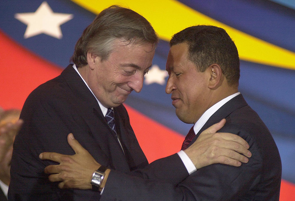 Venezuela - El presidente Néstor Kirchner junto a su par Hugo Chávez, durante el cierre de la rueda de prensa.